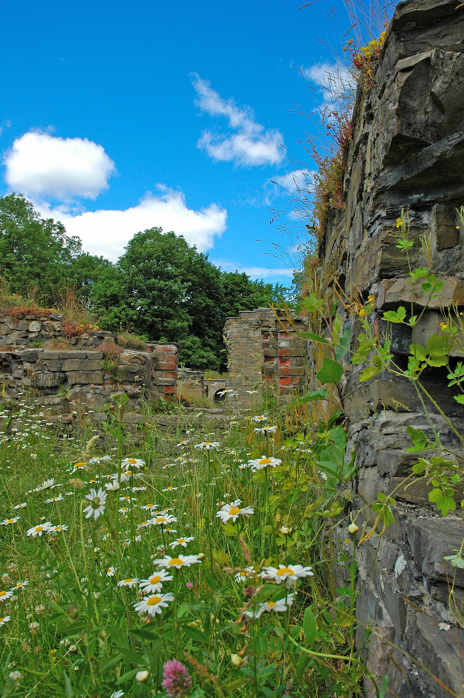 Cloister, Hovedøya island, Oslo, Norway